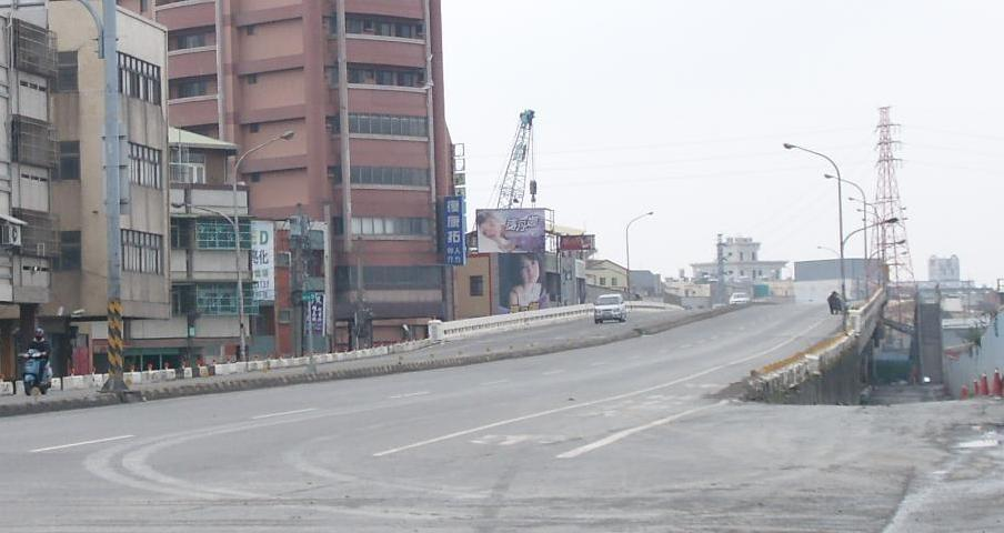 Bân-lâm-gú: 員林鎮莒光路橋，阮攏講天橋，橋名叫員林陸橋，民國64年12月竣工，民國101年3月因為員林市區鐵路高架化計畫共拆掉。